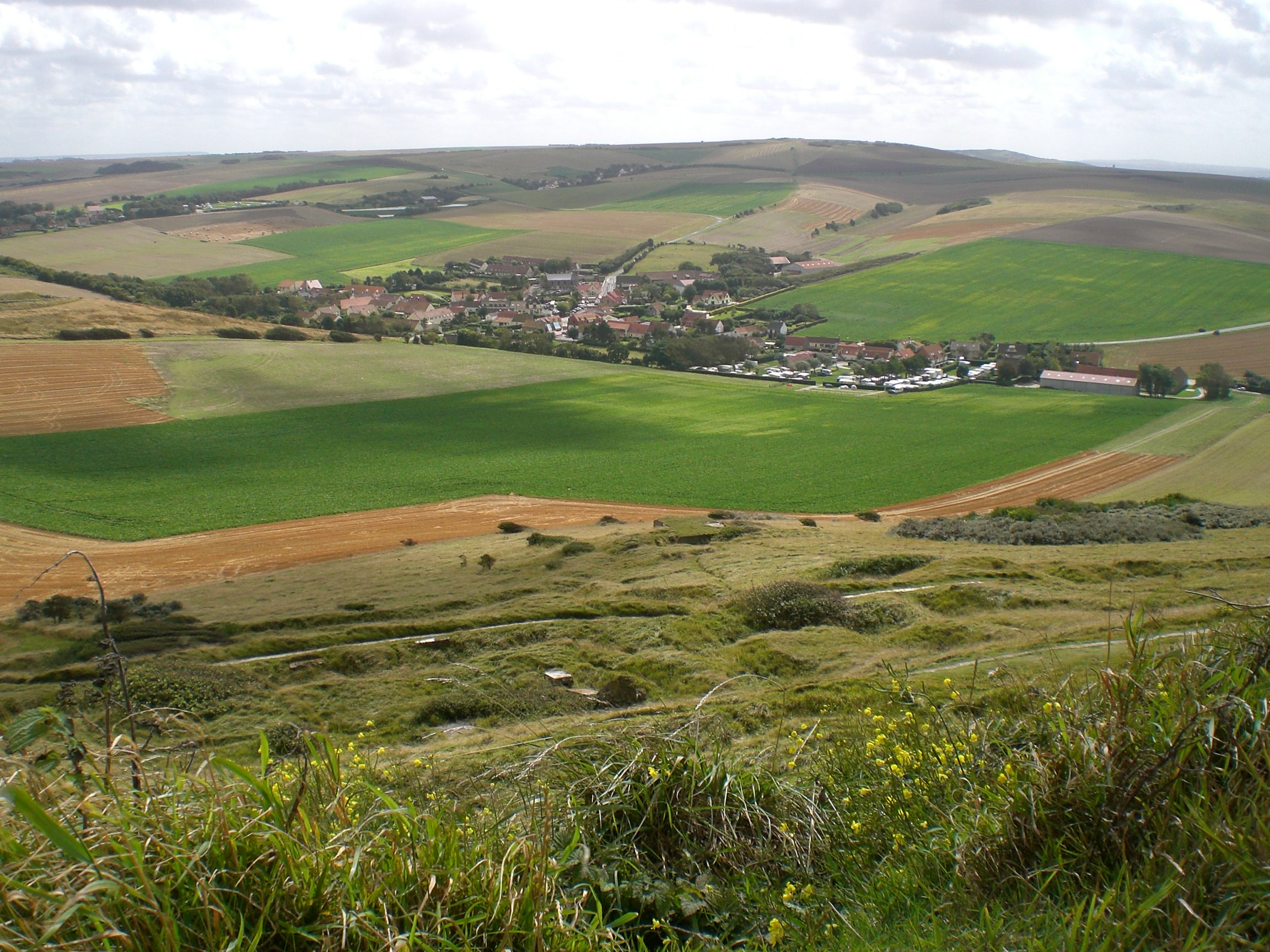 Vue du petit village d'Escalles. Pris de vue réalisé sur le sommet du Cap Blanc-Nez dans le Pas-de-Calais.